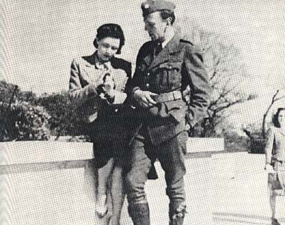 Витезслава Капралова и Иржи Муха